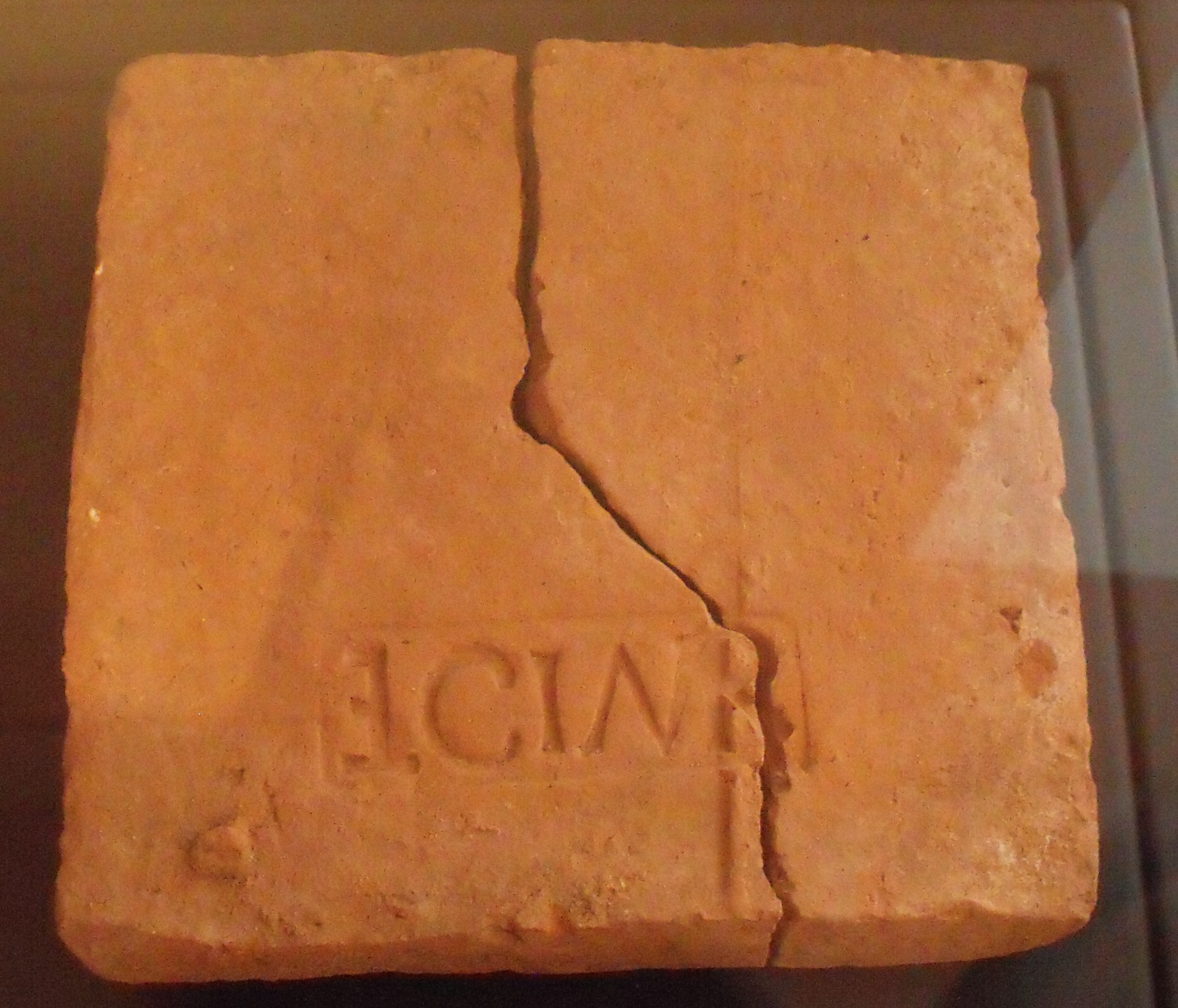 Brique utilisée dans les fortifications du bas empire d'Epomanduodurum, issus des fouilles de Mandeure-Mathay, Musée de Montbéliard Estampille de la légion I Martia